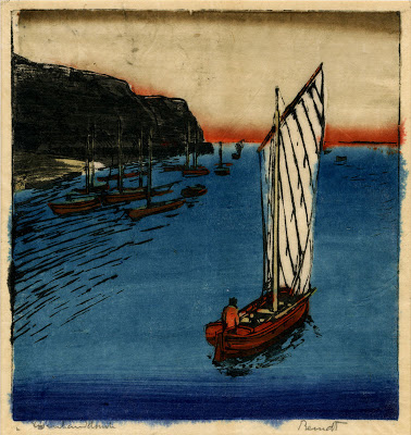 Siegfried Berndt Auf der Reede 1925